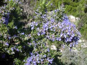 wilder Rosmarin, blühend